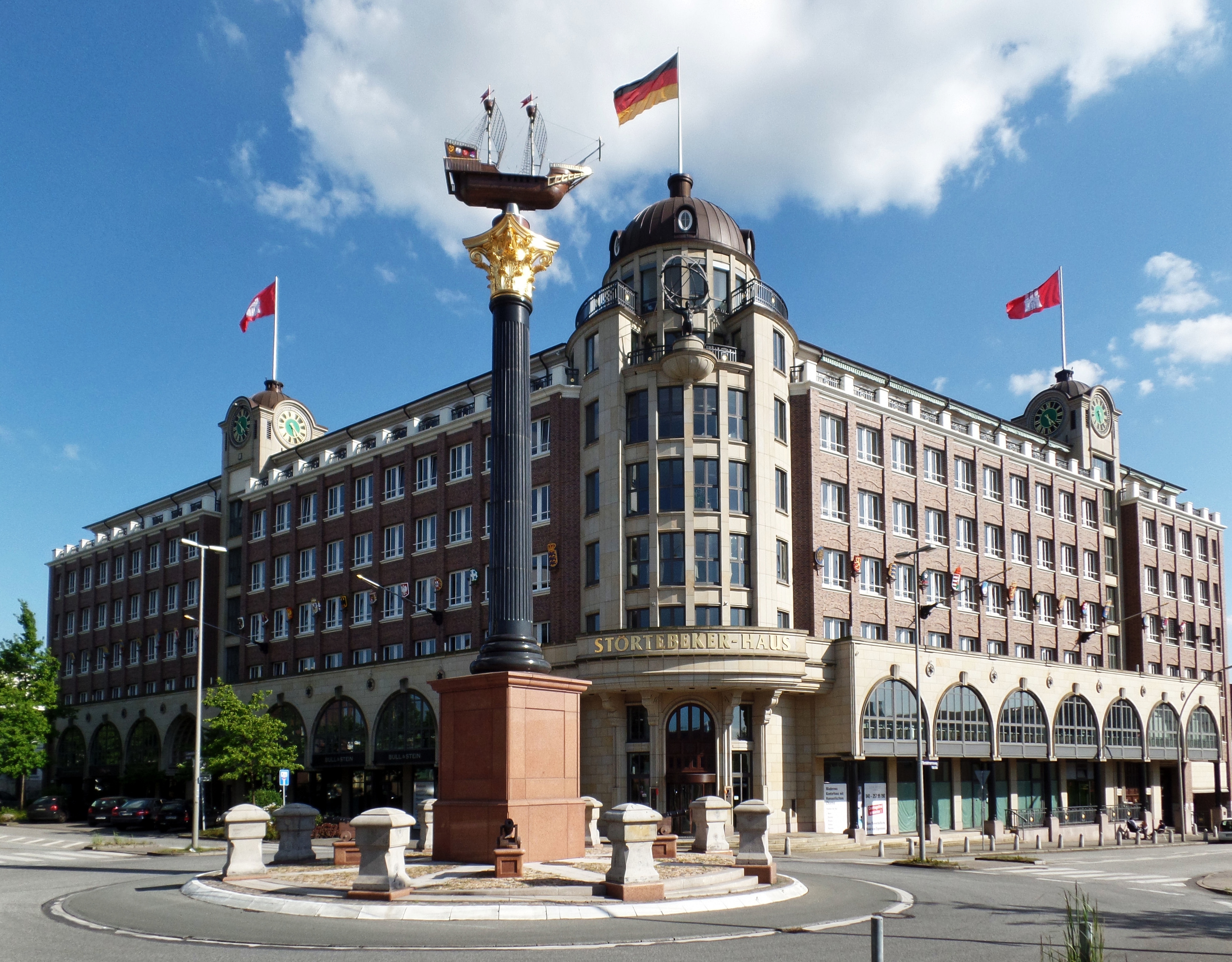 Hamm-Süd, Hamburg, Germany